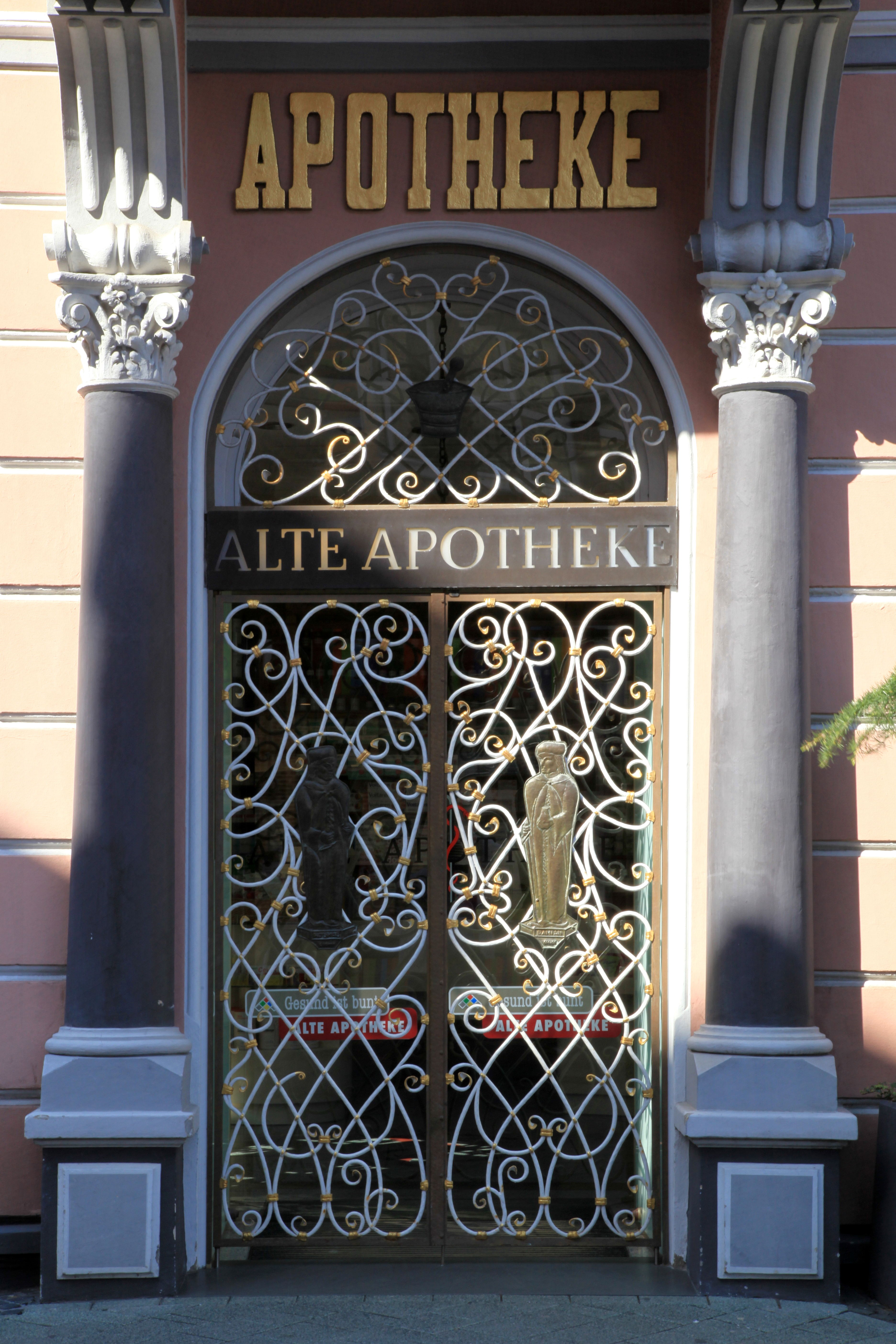 Alte Apotheke, Hochstraße 32 in Bottrop